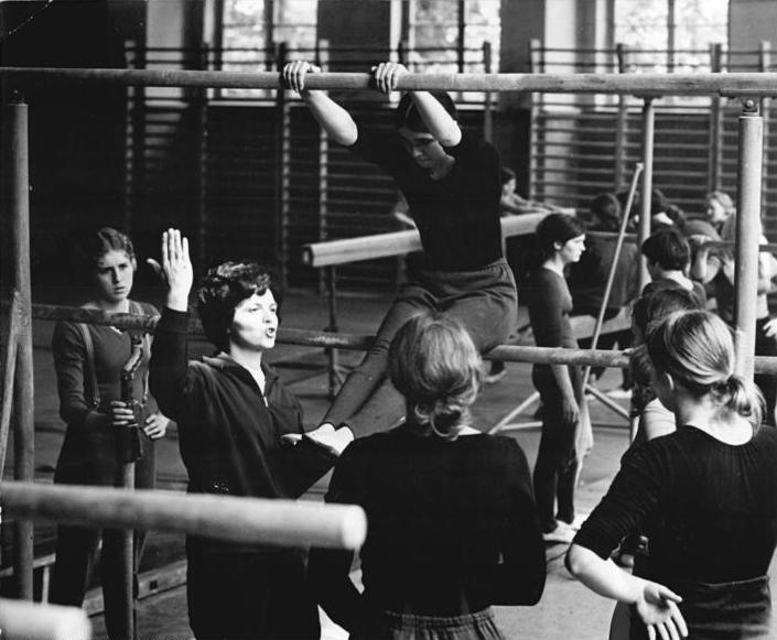 Leipzig, DHfK, Turnhalle, Reck Zentralbild Kluge hsch 10.6.1970-DDR: Deutsche Hochschule für Körperkultur und Sport in Leipzig eine Lehrstätte von Weltruf. Die Deutsche Hochschule für Körperkultur und Sport in Leipzig hat sich seit dem 22.10.1950 in harter und zielstrebiger Arbeit des Lehrkörpers und der Studenten zu einer der grössten und modernsten Lehr- und Forschungsstätte auf den Gebiet des Sports entwickelt. Sie unterhält enge Beziehungen zu zahlreichen wissenschaftlichen Einrichtungen gleicher Art im Ausland. In solidarischer Hilfe wurden bisher Studenten aus mehr als 20 jungen Staaten Afrikas und Asiens ausgebildet. UBz: Unterricht im Geräteturnen.